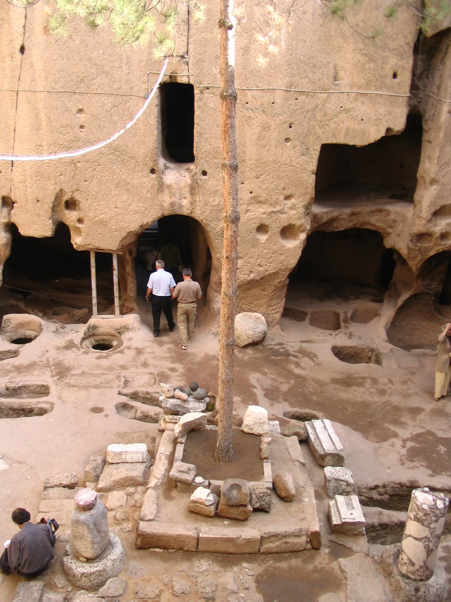 Innenhof der Klosteranlage von Eski Gümüş bei Niğde in Kappadokien, Zentraltürkei